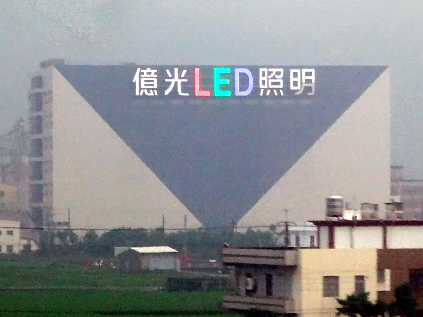 從台灣高鐵北上列車西向俯望億光電子苑裡廠（苗栗縣苑裡鎮玉田里國光巷35號，2008年落成）。